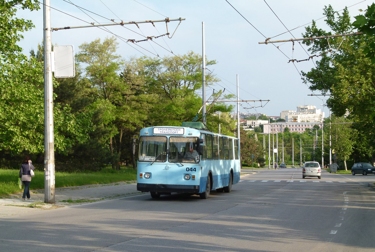 Тролейбус ЗиУ в Добрич